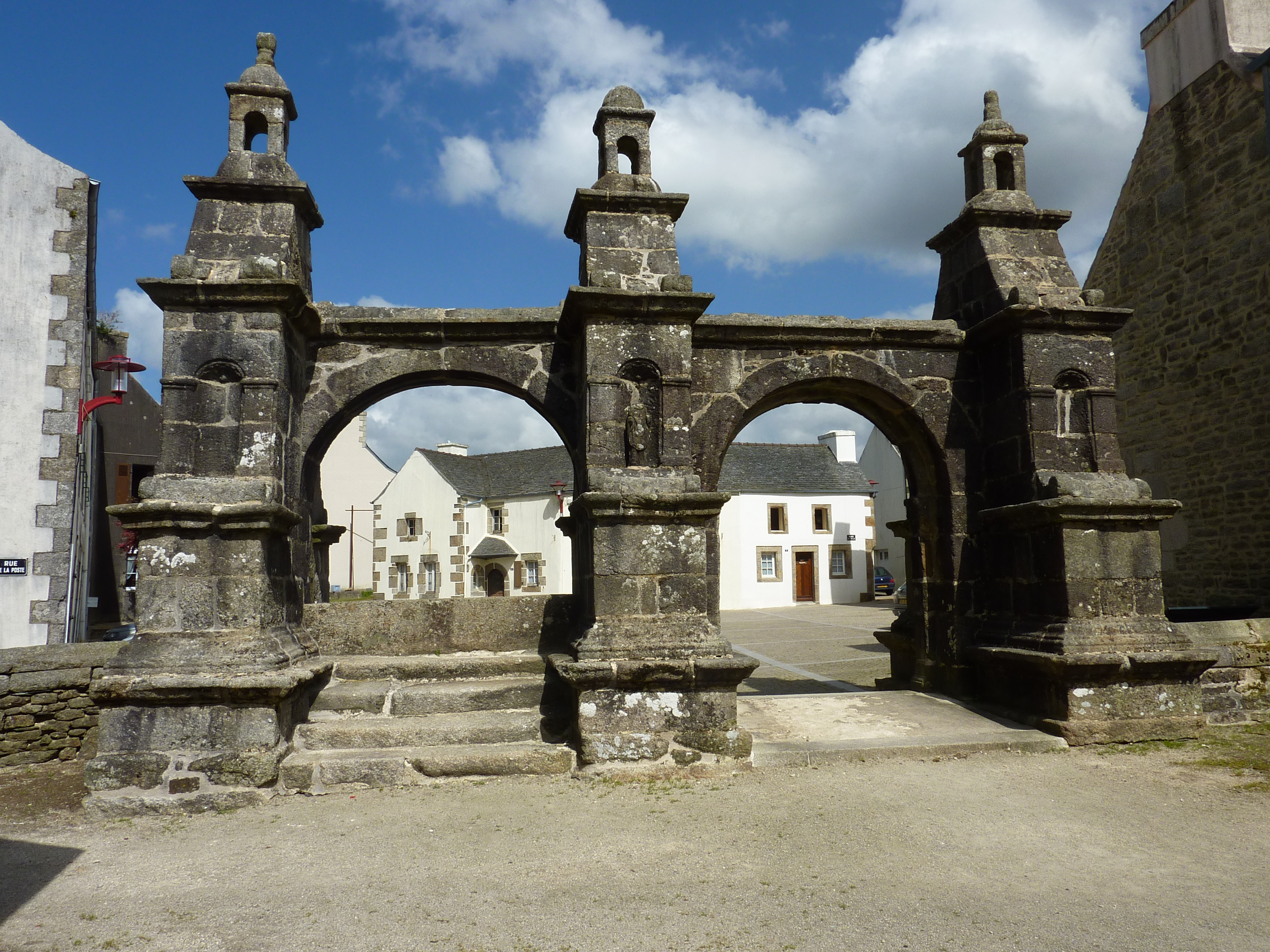 Arc de triomphe Plounéour-Menez 2